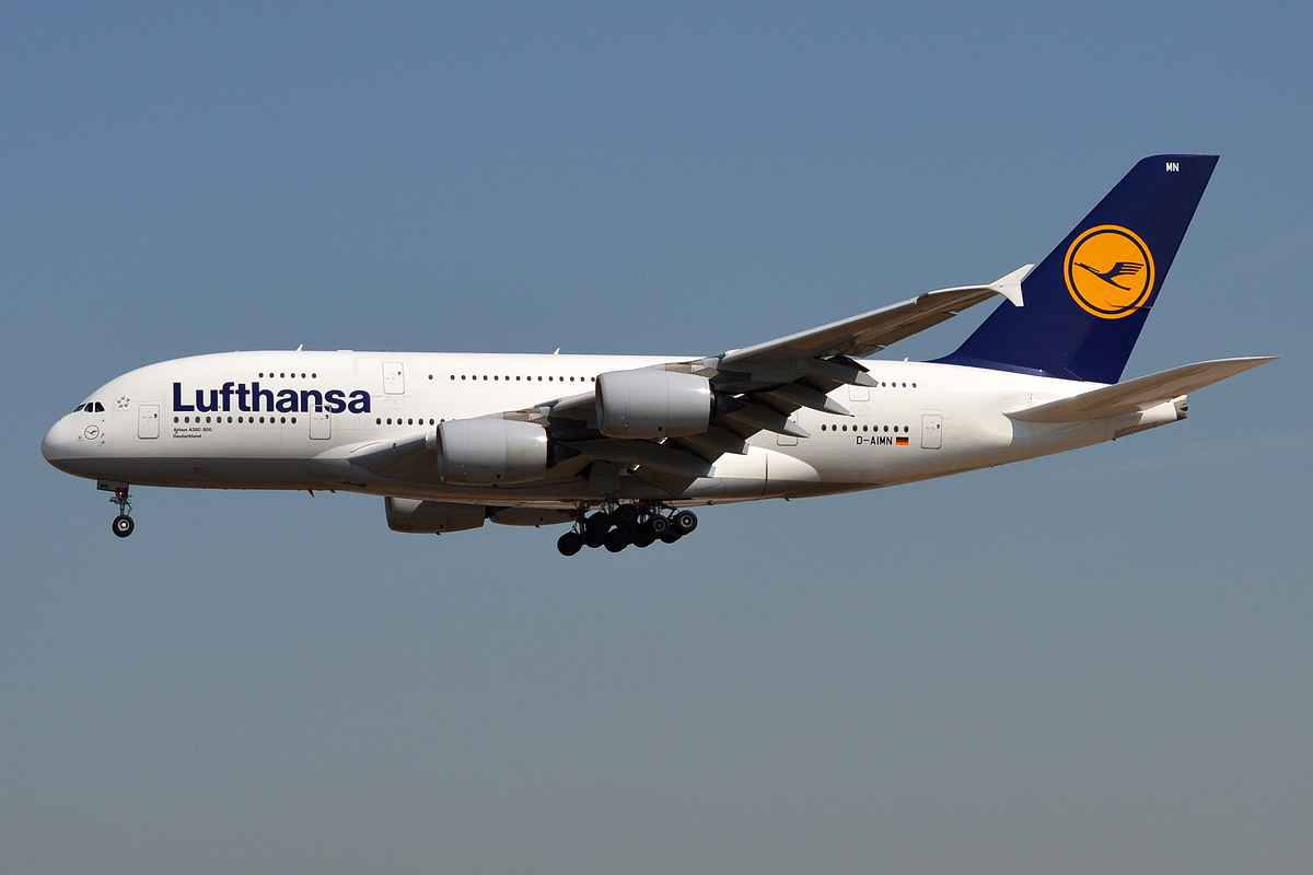 Lufthansa, D-AIMN, Airbus A380-841